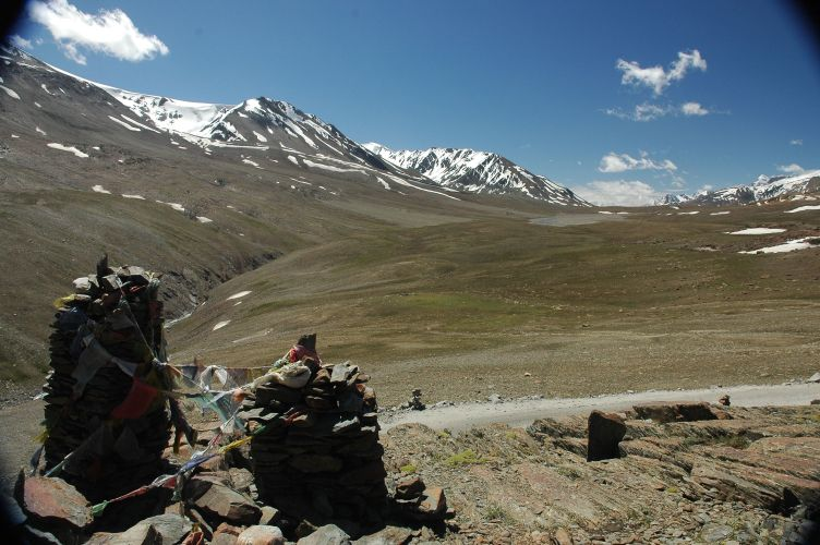 Bara Laacha La